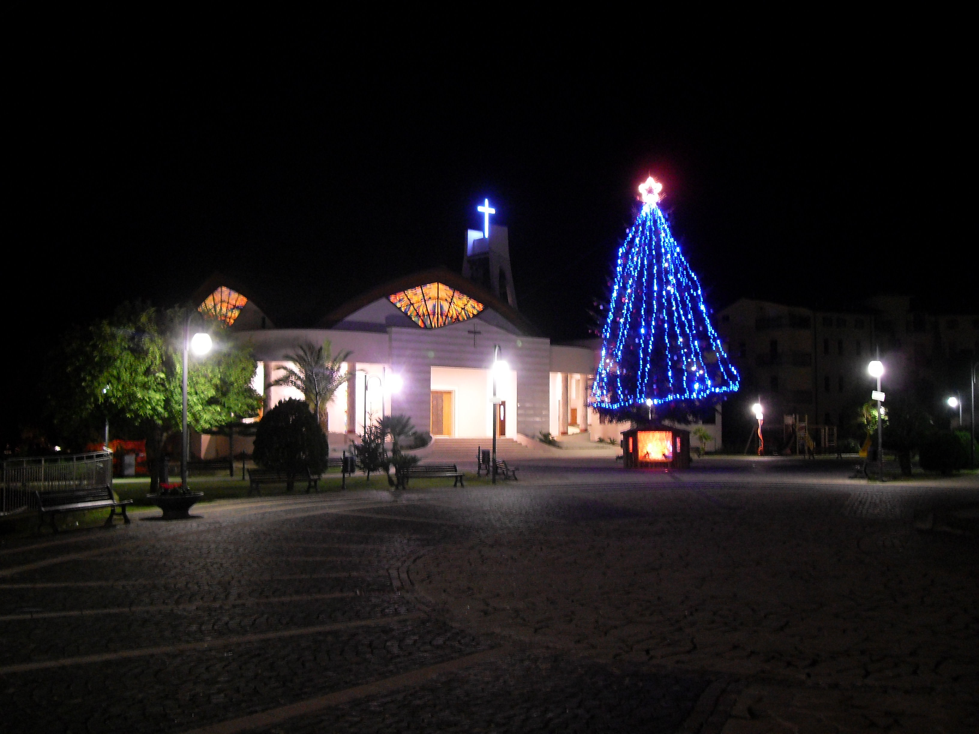 Piazza San Francesco di Paola in Campora San Giovanni durante le Festività Natalizie del 2010